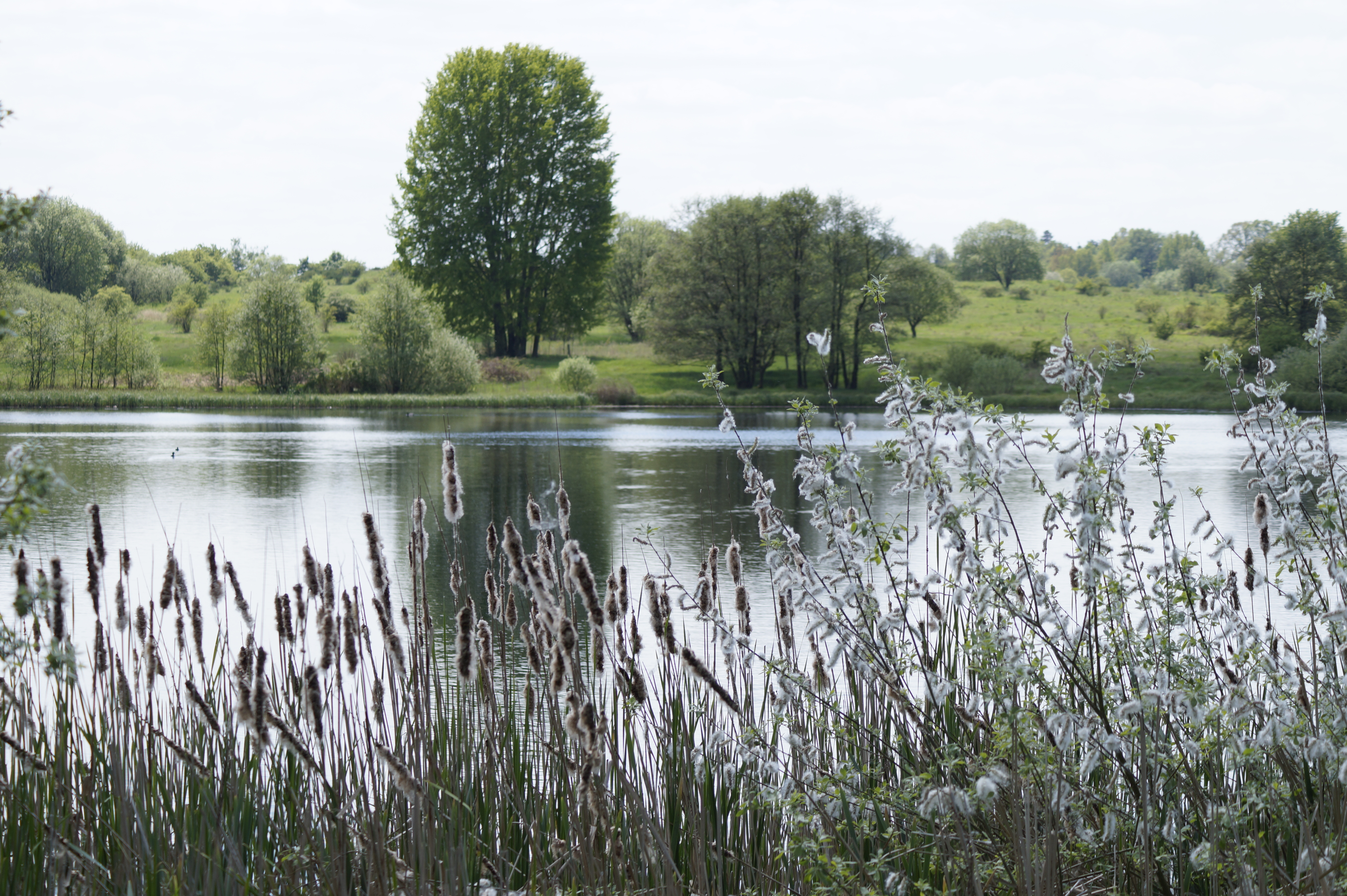 Naturschutzgebiet "Großer Weidenteich" (C58): Der Große Weidenteich mit seinem Schilfgürtel und einer unzugänglichen Insel ist ein idealer Lebensraum für Wasservögel